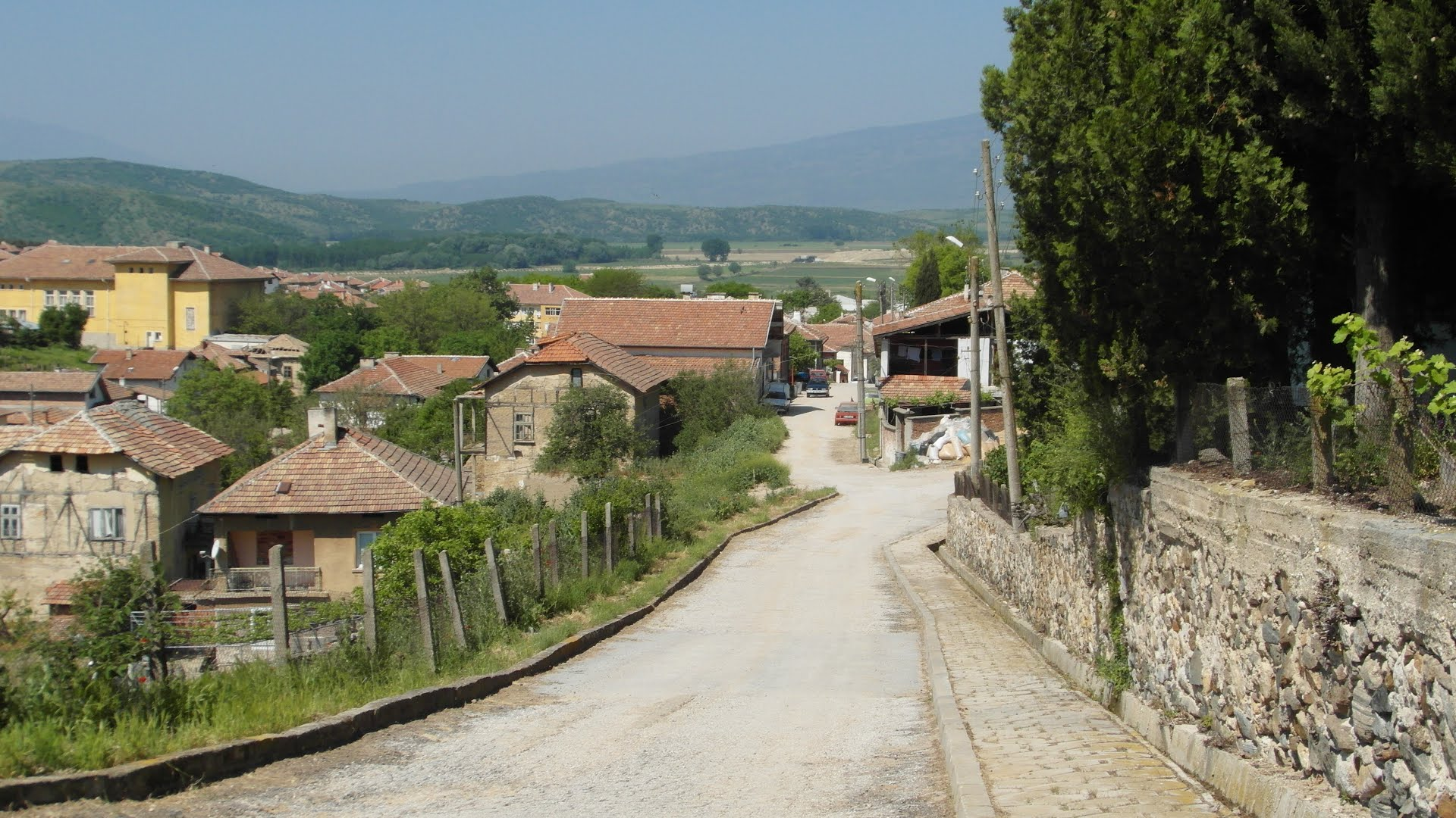 Марикостиново